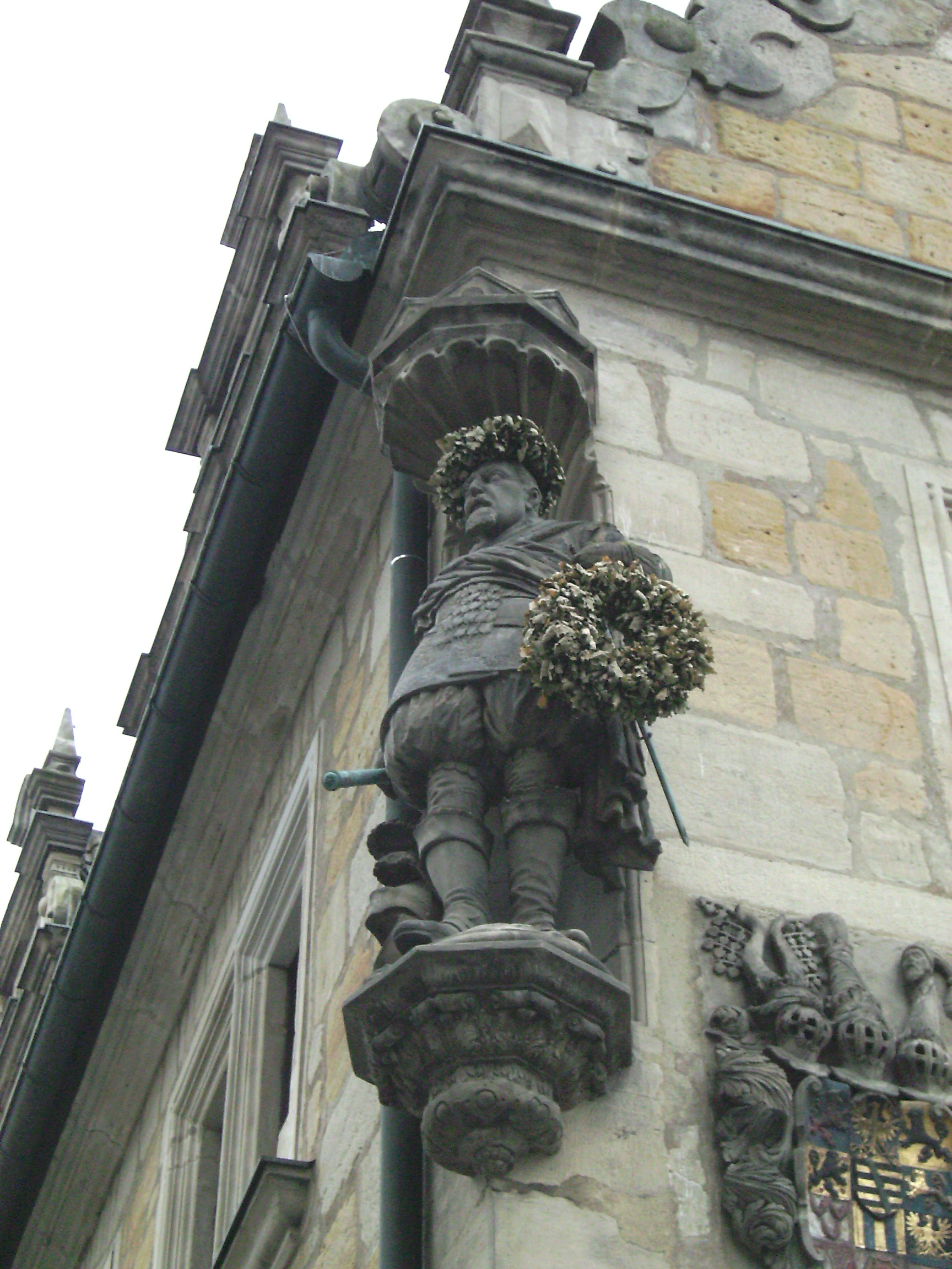 Bekränzter Johann Casimir Gymnasium Casimirianum Coburg Bayern Deutschland